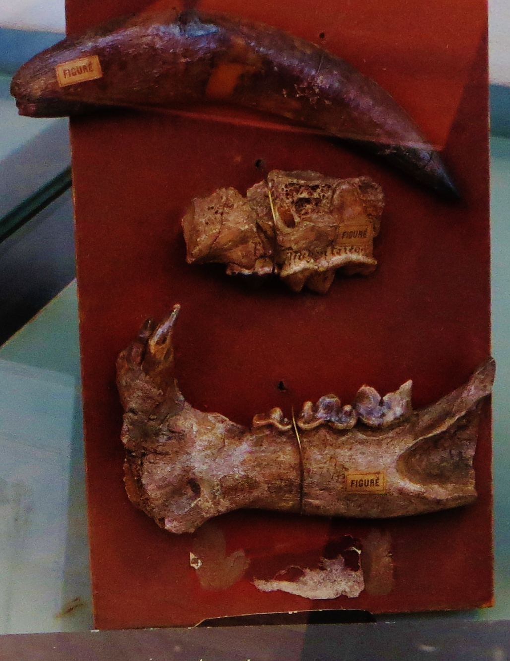 Fossil of Megantereon, an extinct mammal- Took the photo at Musee d'Histoire Naturelle, Paris